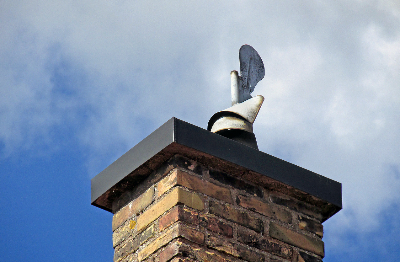 Skorsten med en Vindflöjel.